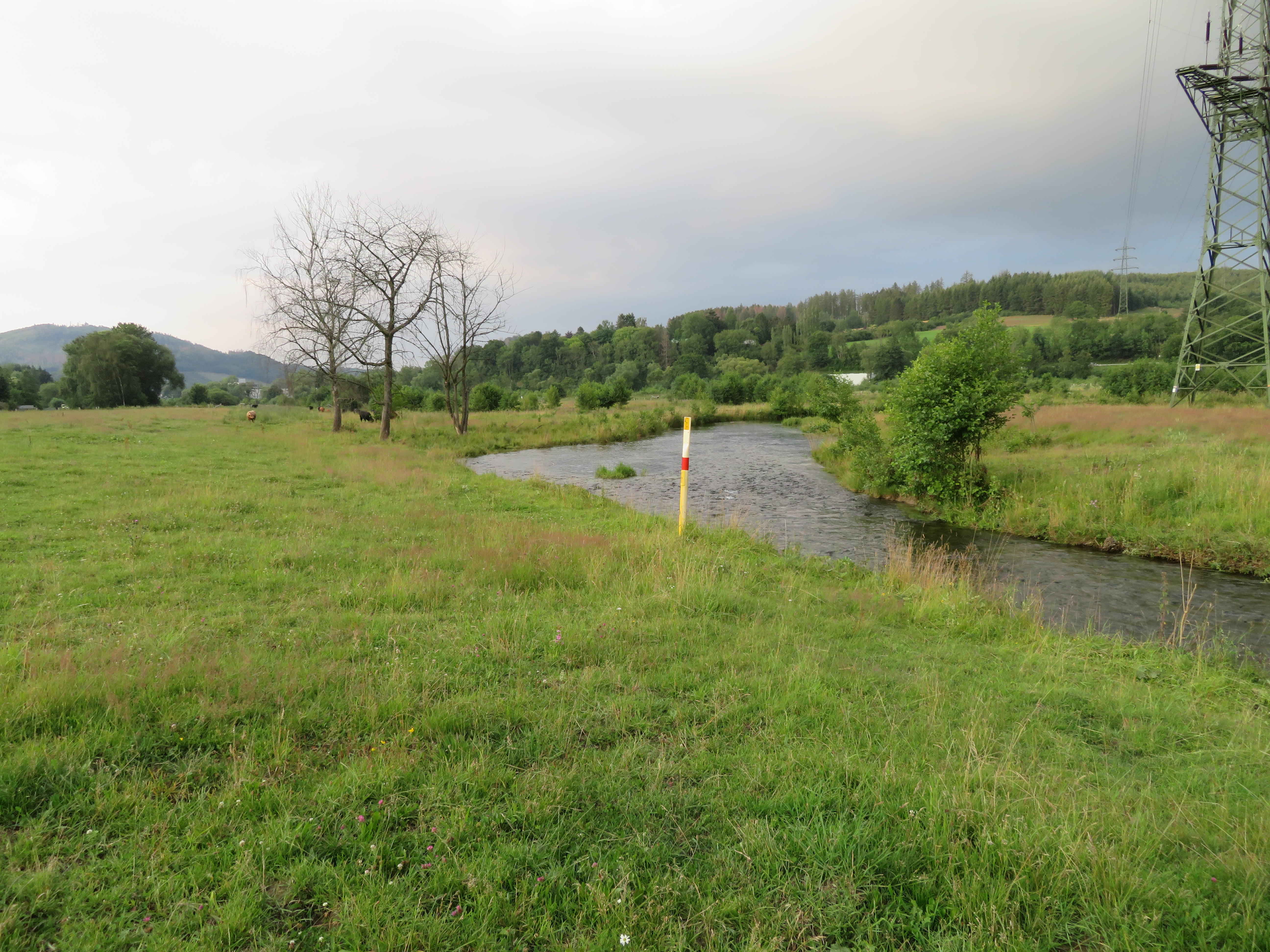 Landschaftsschutzgebiet Sorpewiesen Lange Erlen​ (nur Offenland) mit Sorpe von Westen.